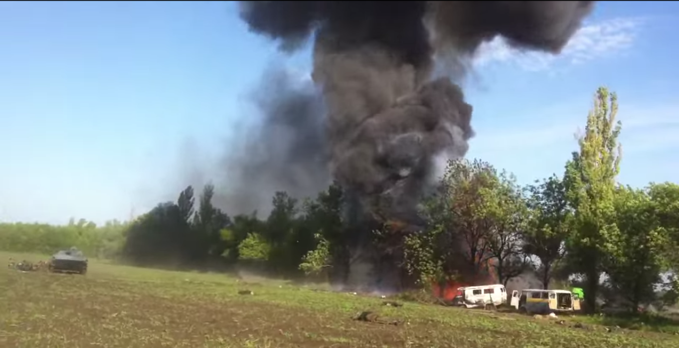 Кадр з відеозйомки бою під Волновахою